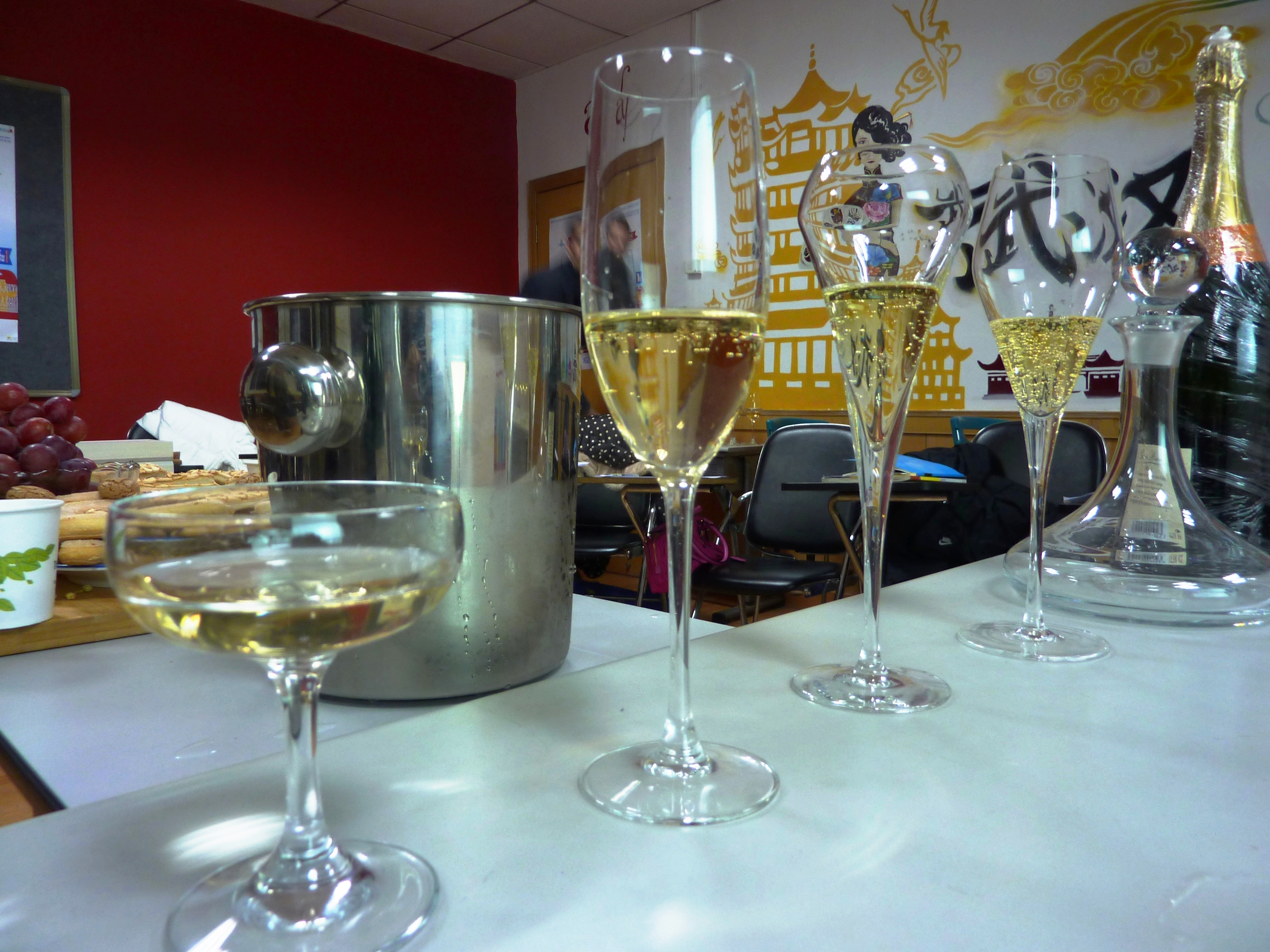 Coupe et flûtes à l'Alliance française de Wuhan (